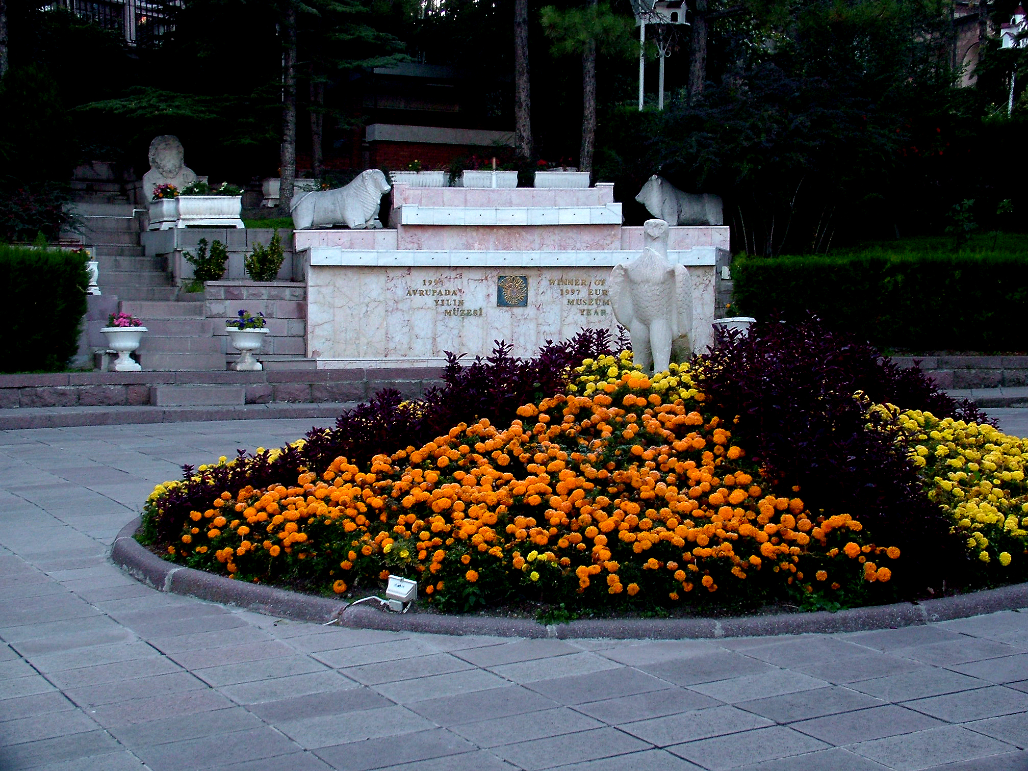 Előkert az Anatóliai Civilizációk Múzeumánál, Ankara, Törökország)